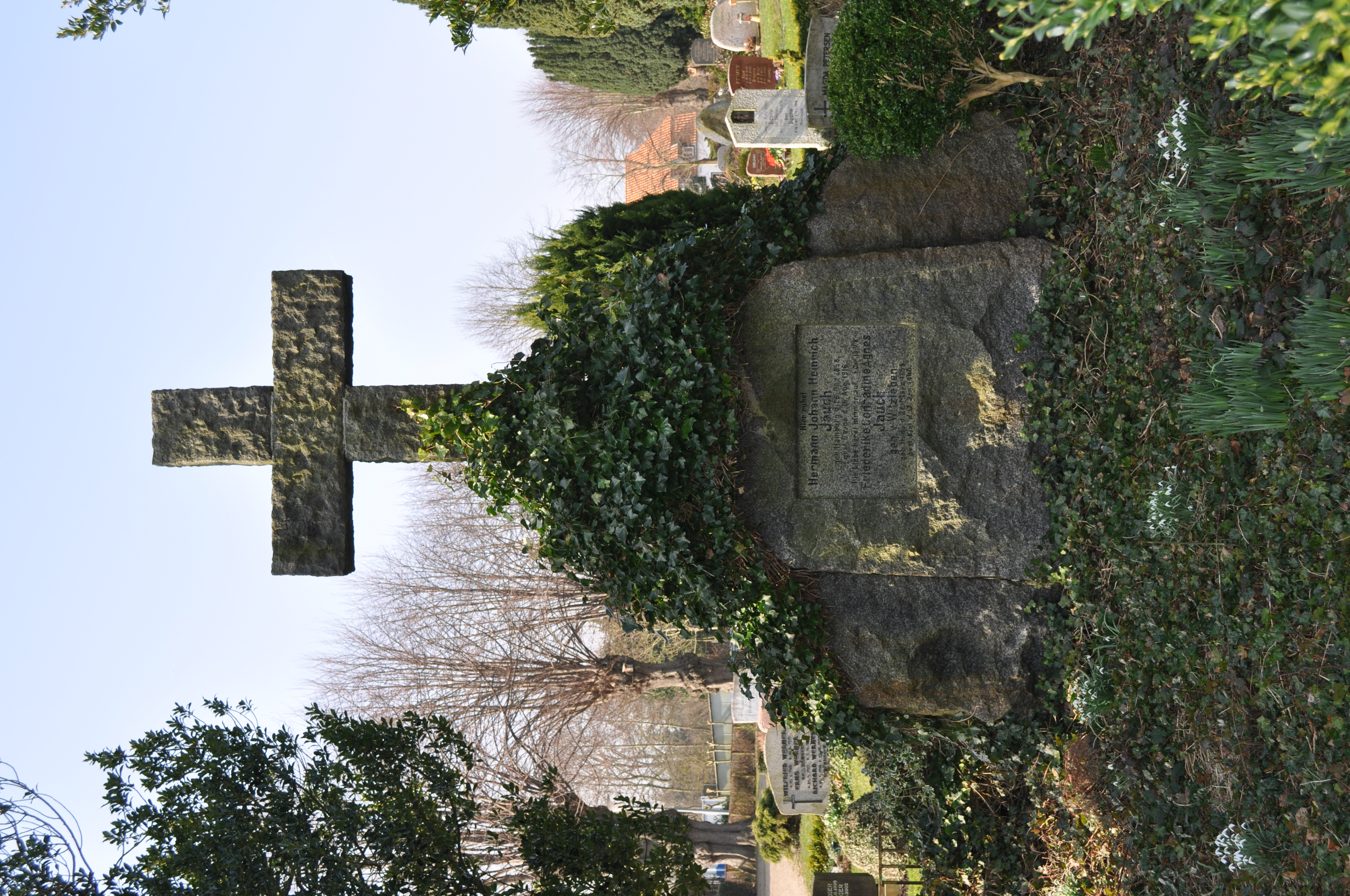 Grabmal Jauch auf dem Friedhof von Karby